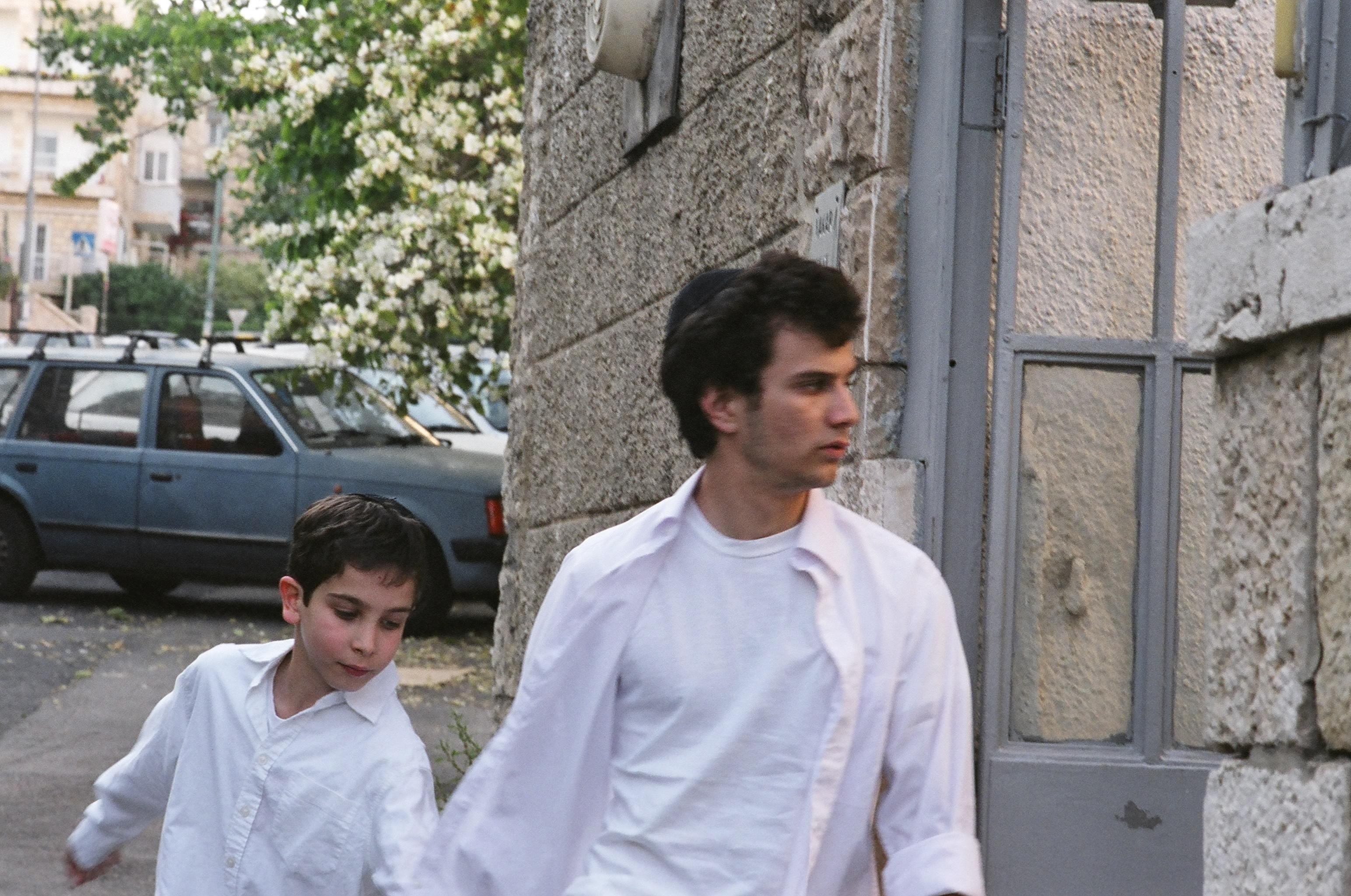 סרטו של רפאל נג'ארי "תהילים", 2007